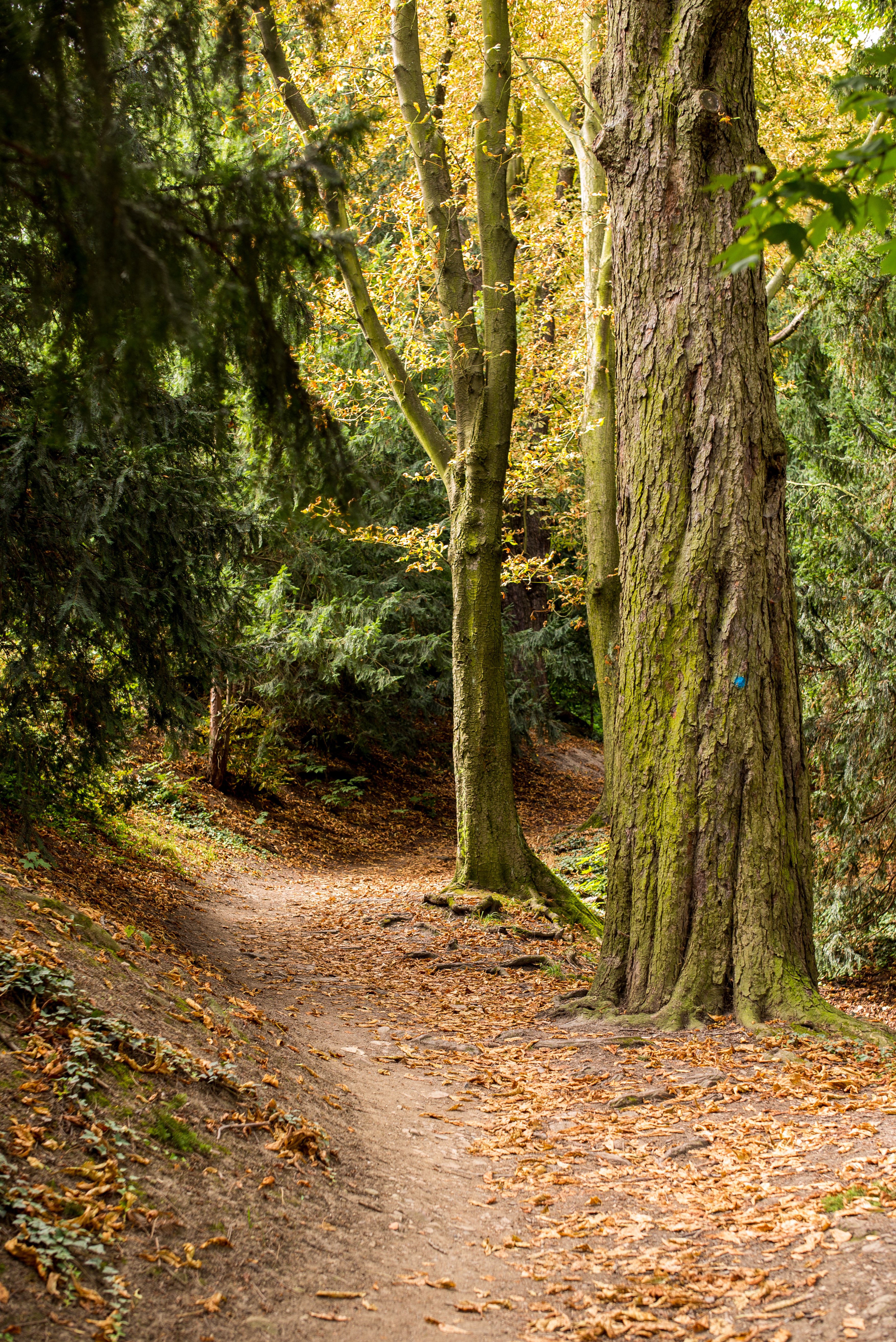 Petřín